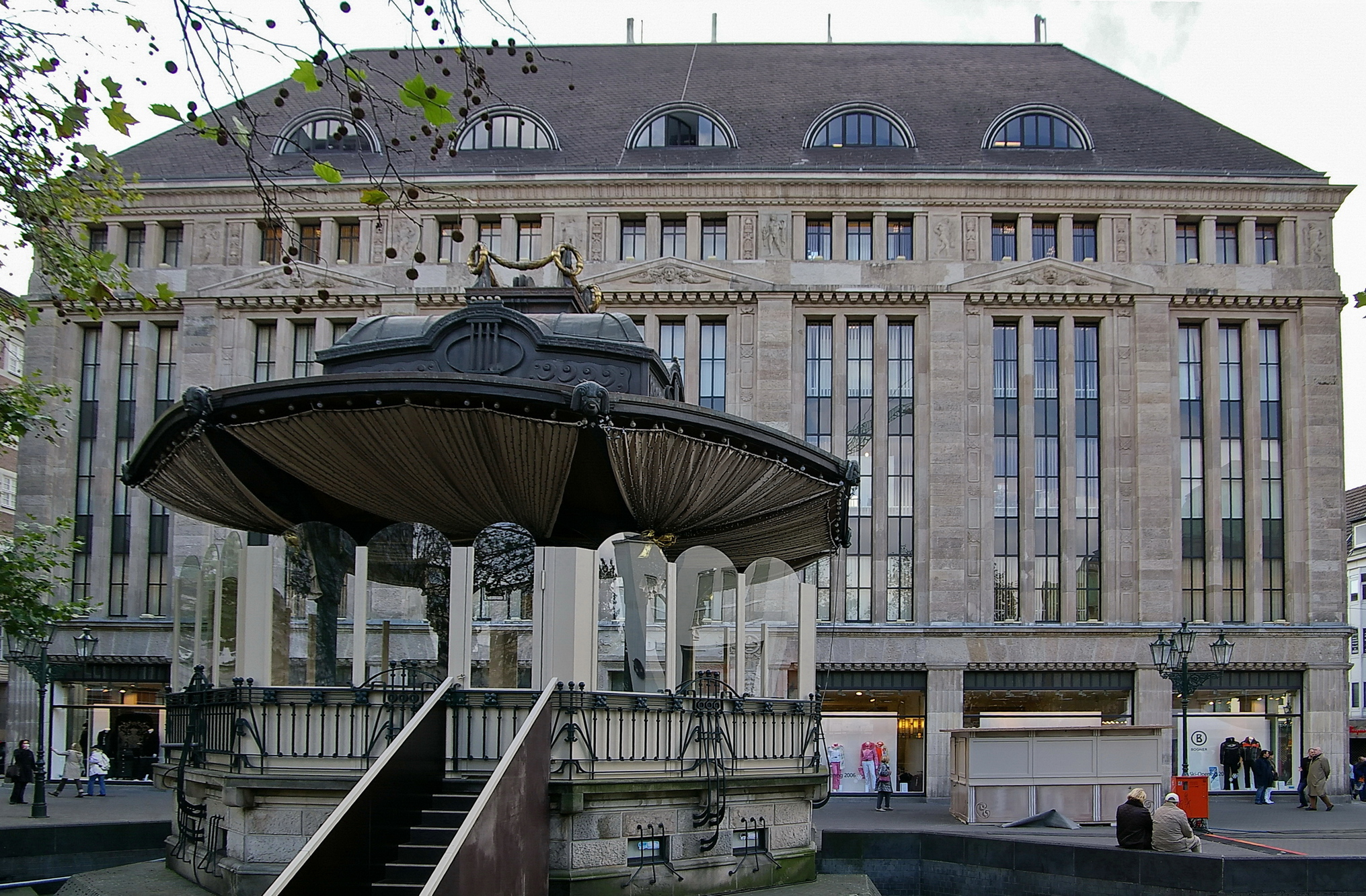 Carsch-Haus in Düsseldorf, Vordereingang mit Pavillon des Wilhelm-Marx-Hauses